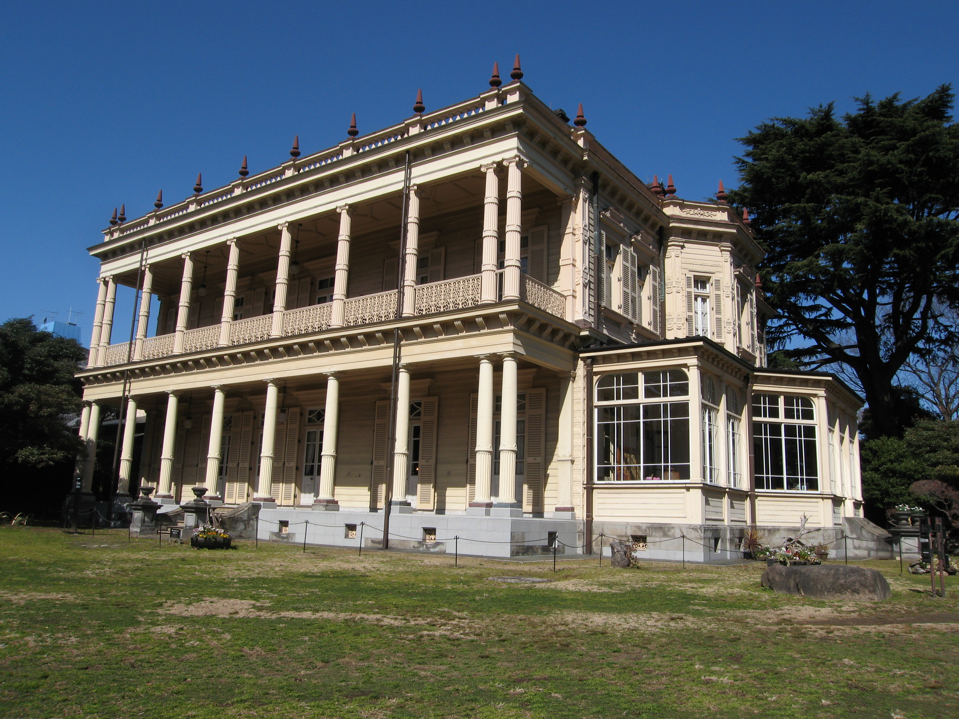 Iwasaki's House in Tokyo,Japan.